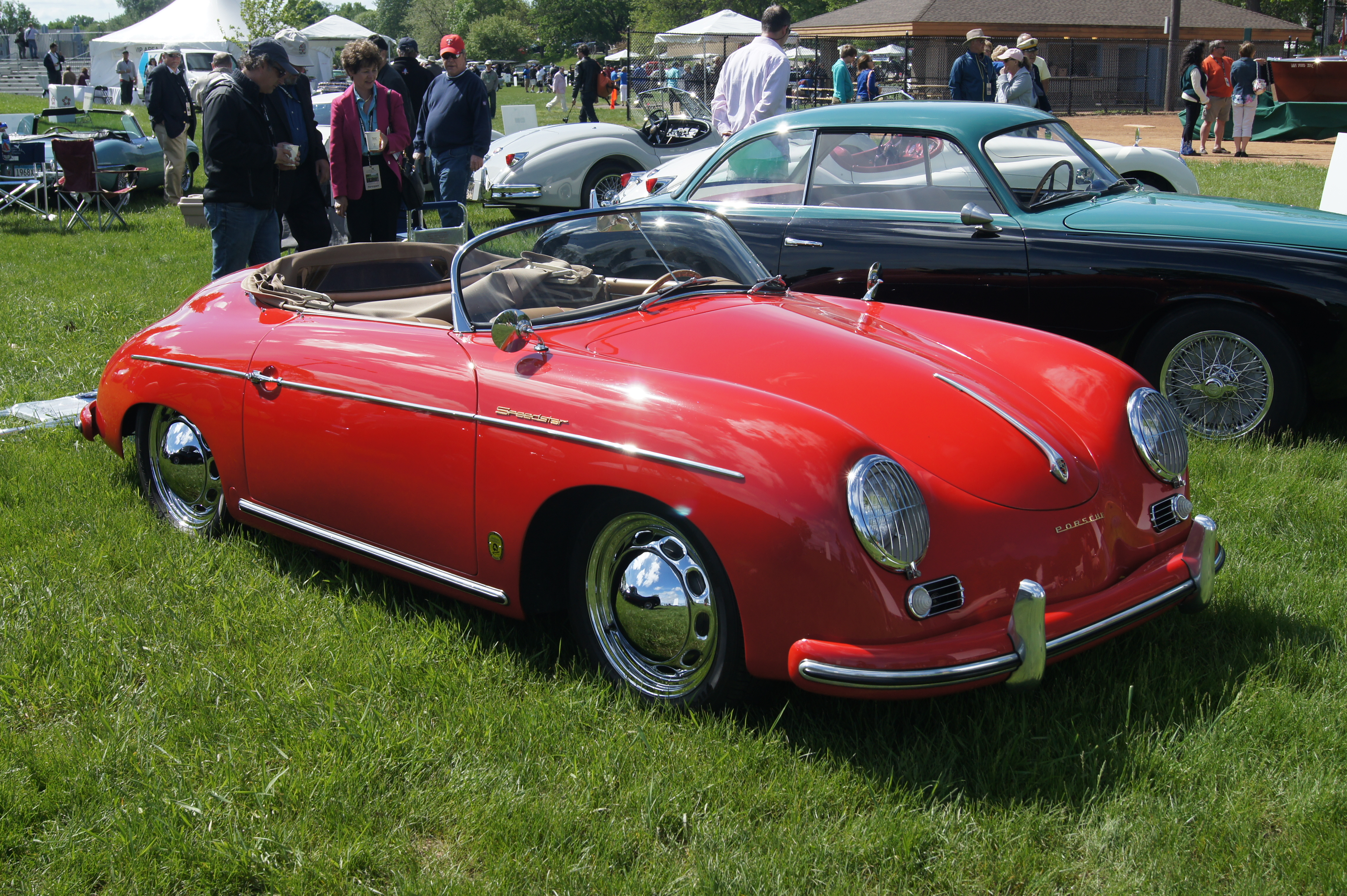 55 Porsche Speedster